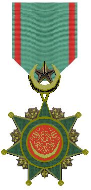 Turkse ridderorde